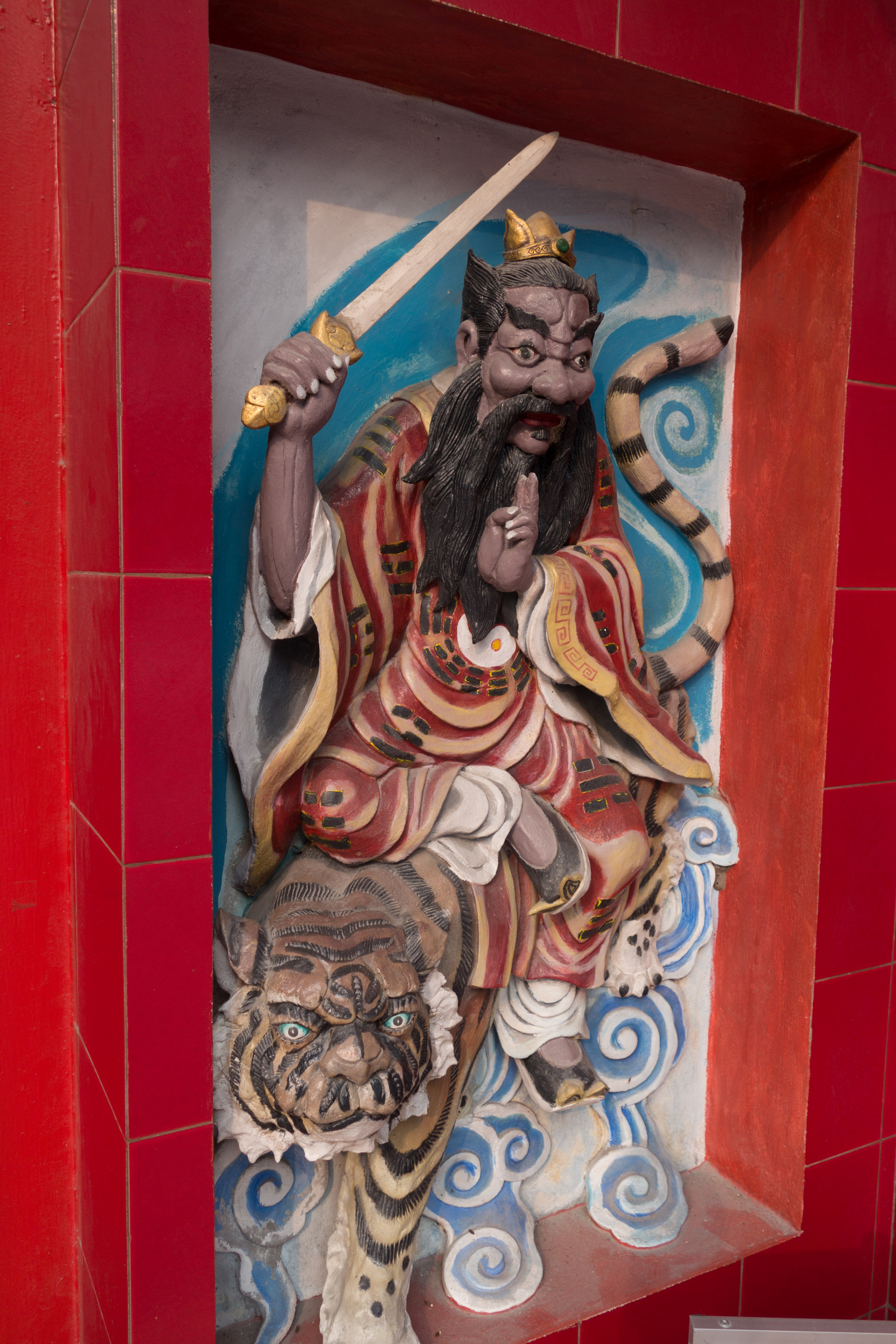 Semenggoh Nature Reserve, Sarawak, Borneo, Malaysia 2015